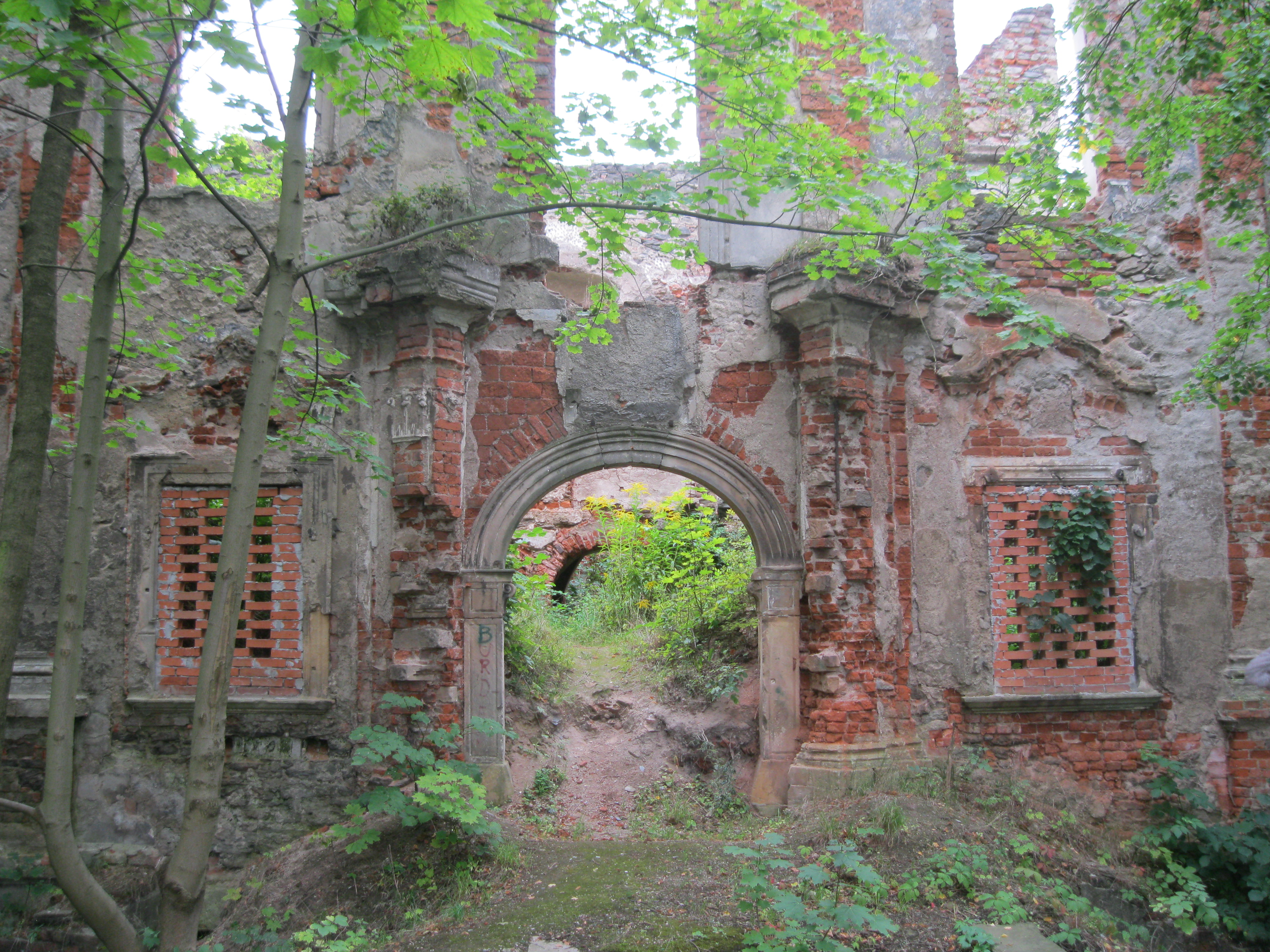 Łażany - pałac - ruina (zabytek nr rejestr. A/4410/406 z dn. 24.11.1956)